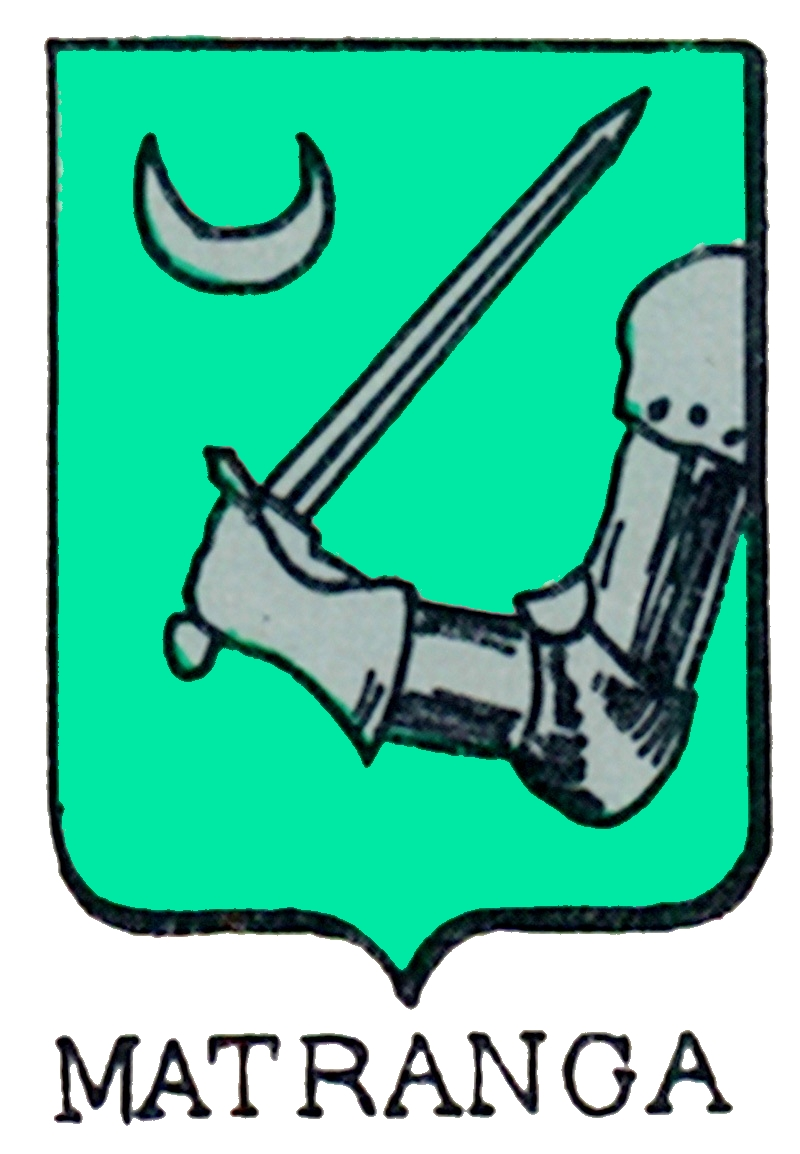 Arma: di verde, al braccio armato movente dal fianco sinistro dello scudo impugnante una spada d’argento alta in sbarra, accompagnata nel canton destro del capo da un crescente dello stesso. La spada simboleggia la resistenza e l'impegno della casata albanese dei Matrënga contro i turchi-ottomani, rappresentati dalla mezzaluna musulmana, eroicamente respinti dagli albanesi nel XV secolo.